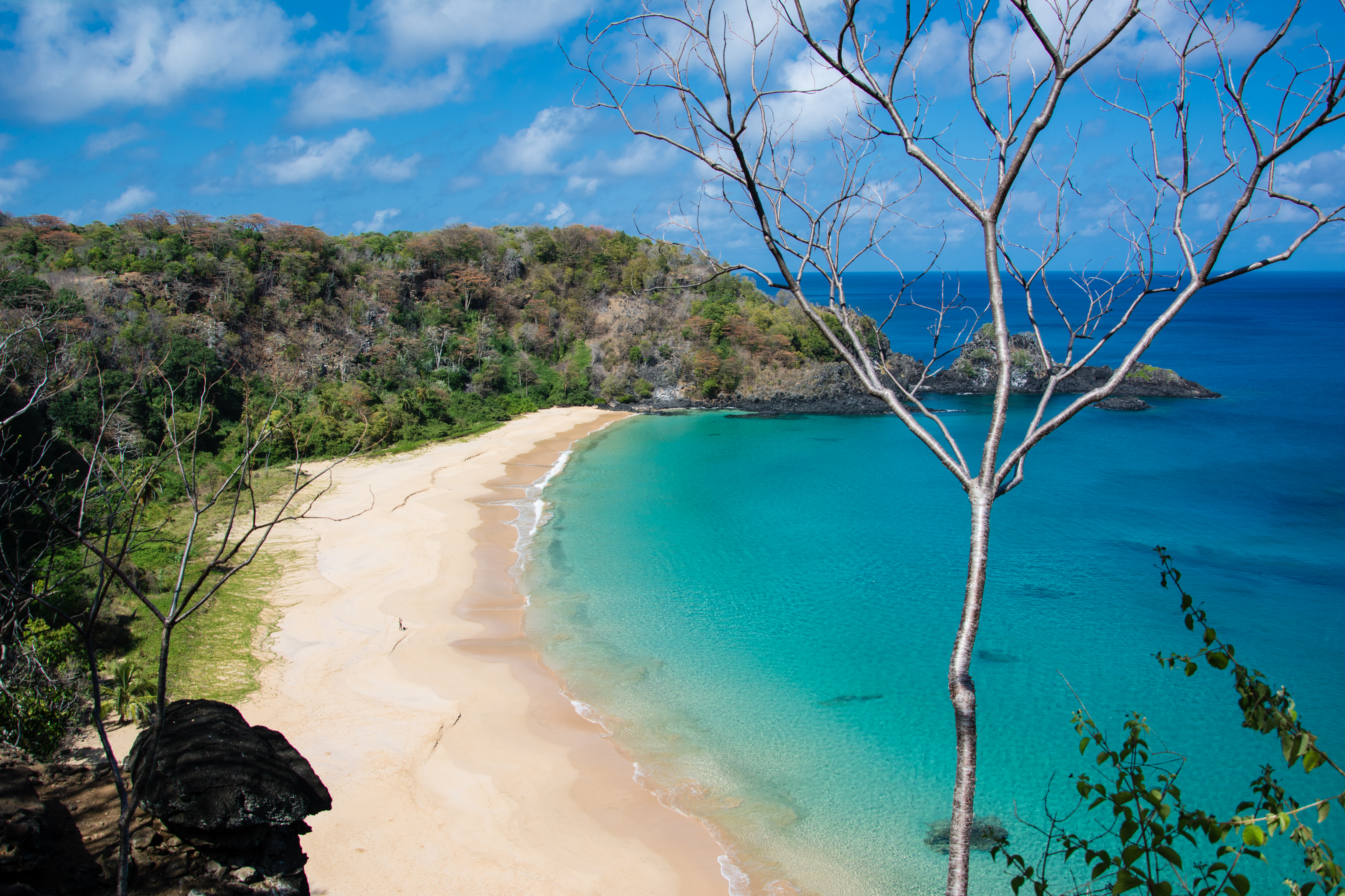 Baia do Sancho